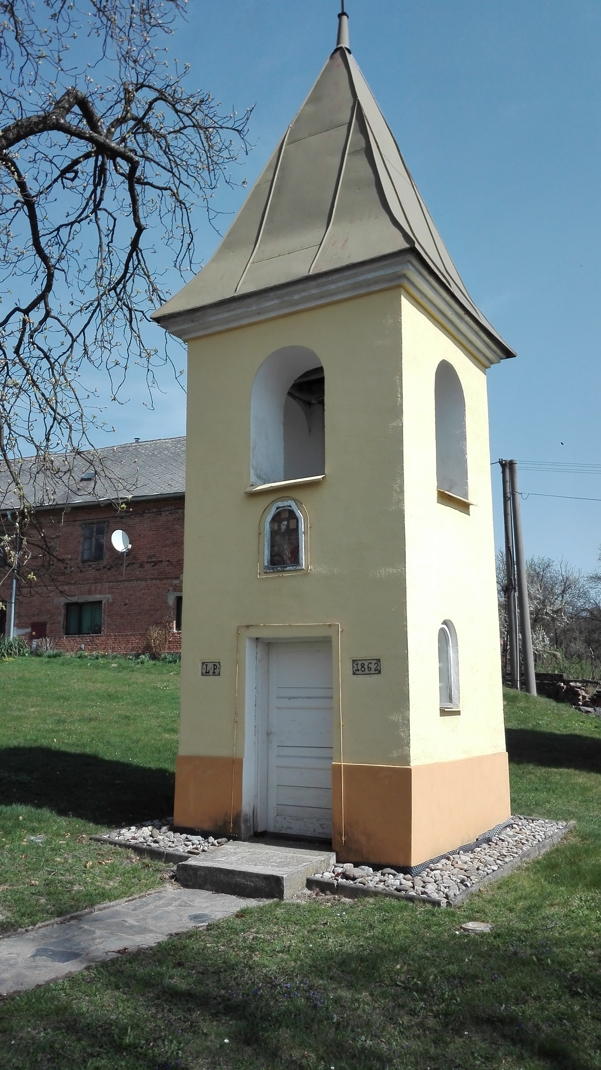 Lošovská kaplička